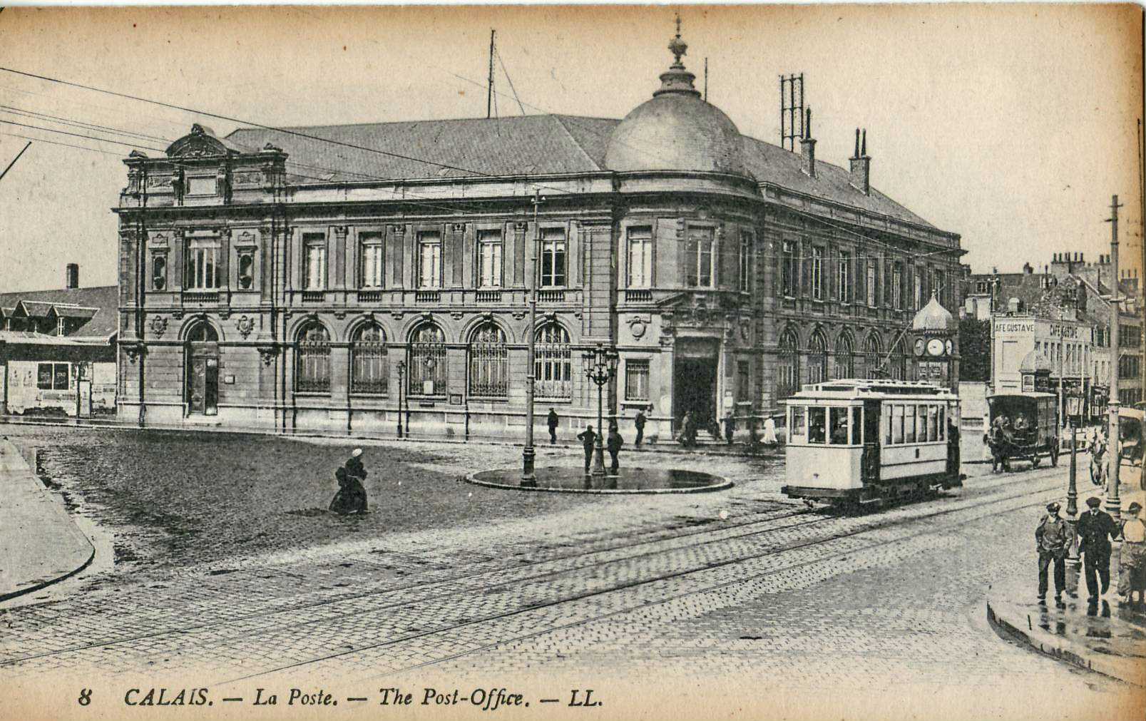 Carte postale ancienne éditée par LL n°8 :CALAIS - La Poste